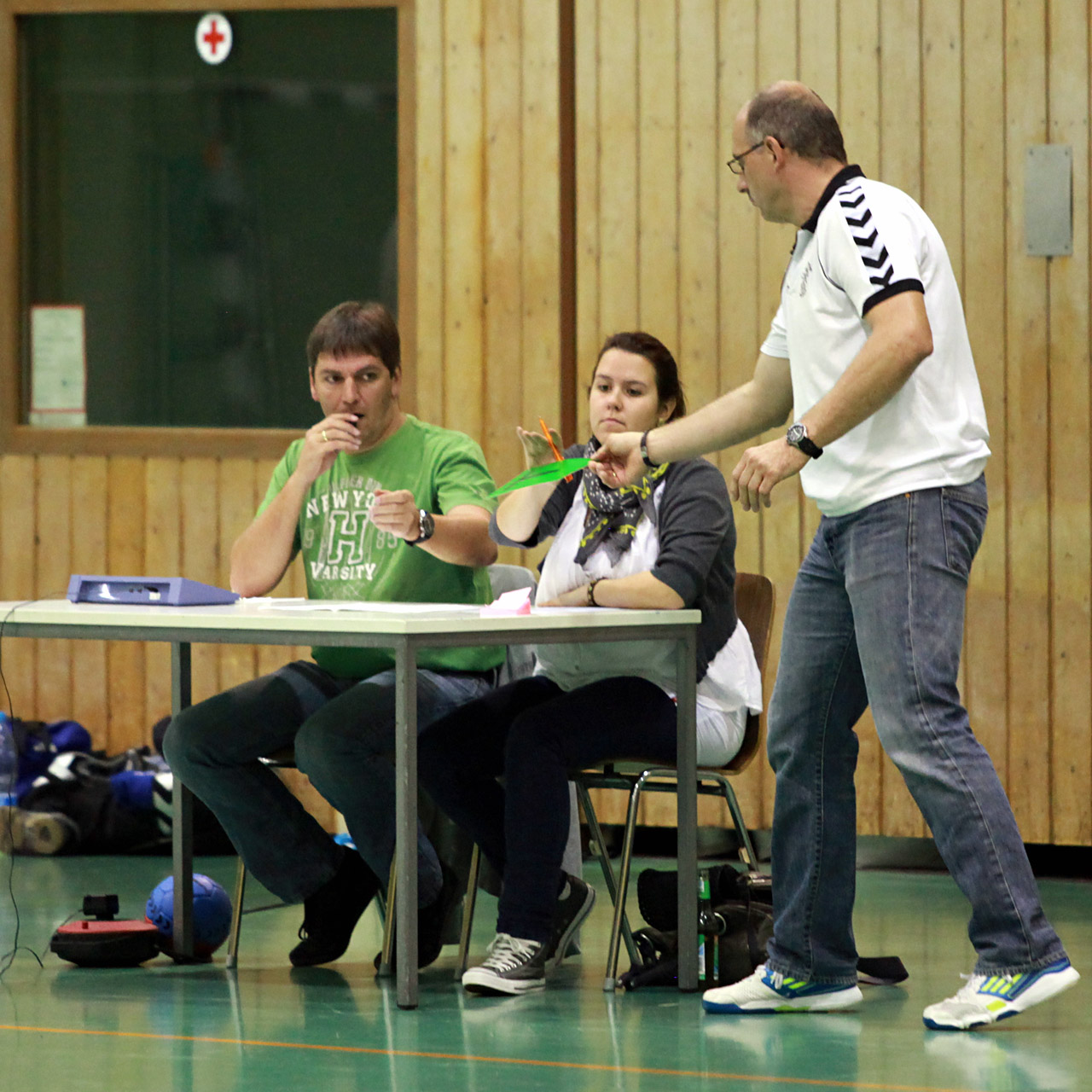 Ein Handballtrainer nimmt durch das Legen der Grünen Karte eine Auszeit. Szene aus dem Spiel TV Büttelborn gegen TV Groß-Rohrheim am 20. Oktober 2012 in Büttelborn/Klein-Gerau